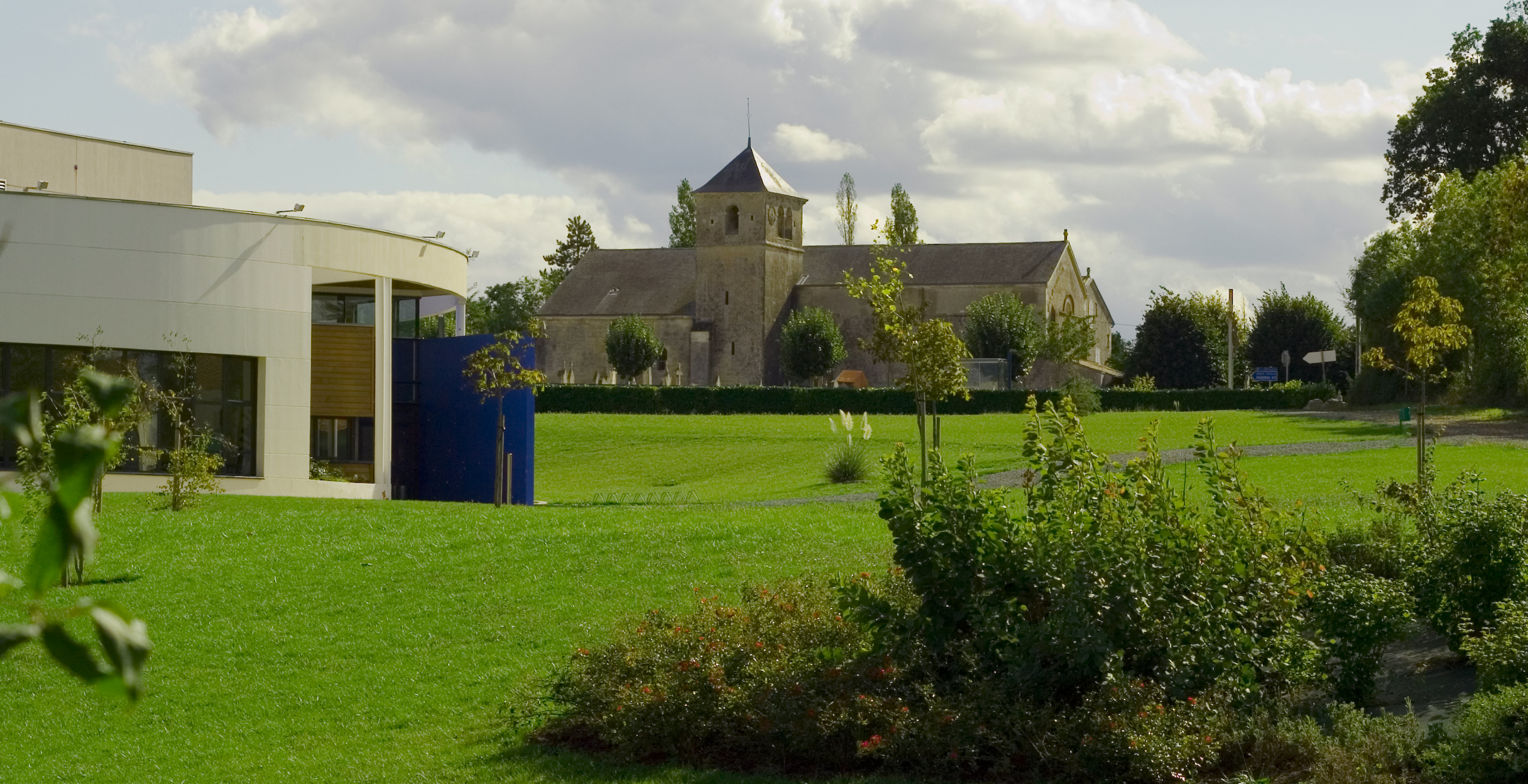 Ville d'Aiffres, l'espace Tartalin et l'église St Pierre.